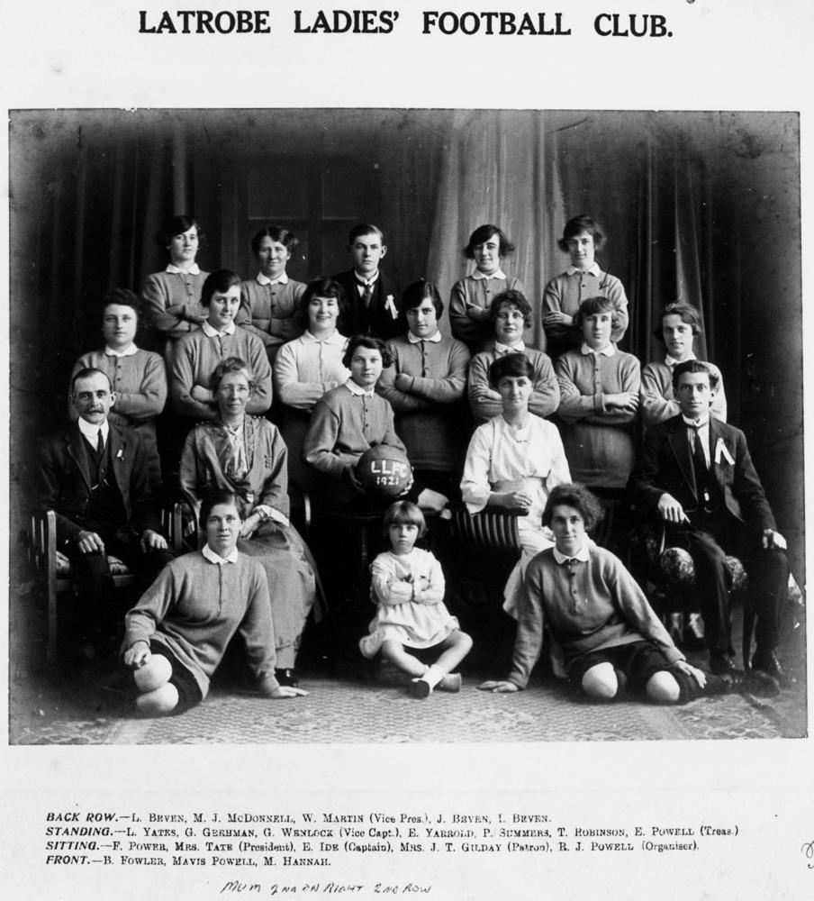 Latrobe Ladies 1921